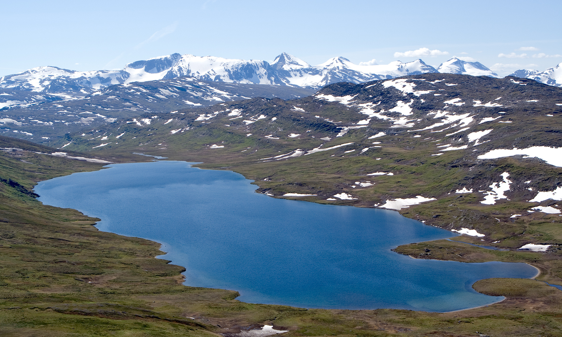 Vy mot Gáhpesjávrre från berget Lágotjåhkkå.